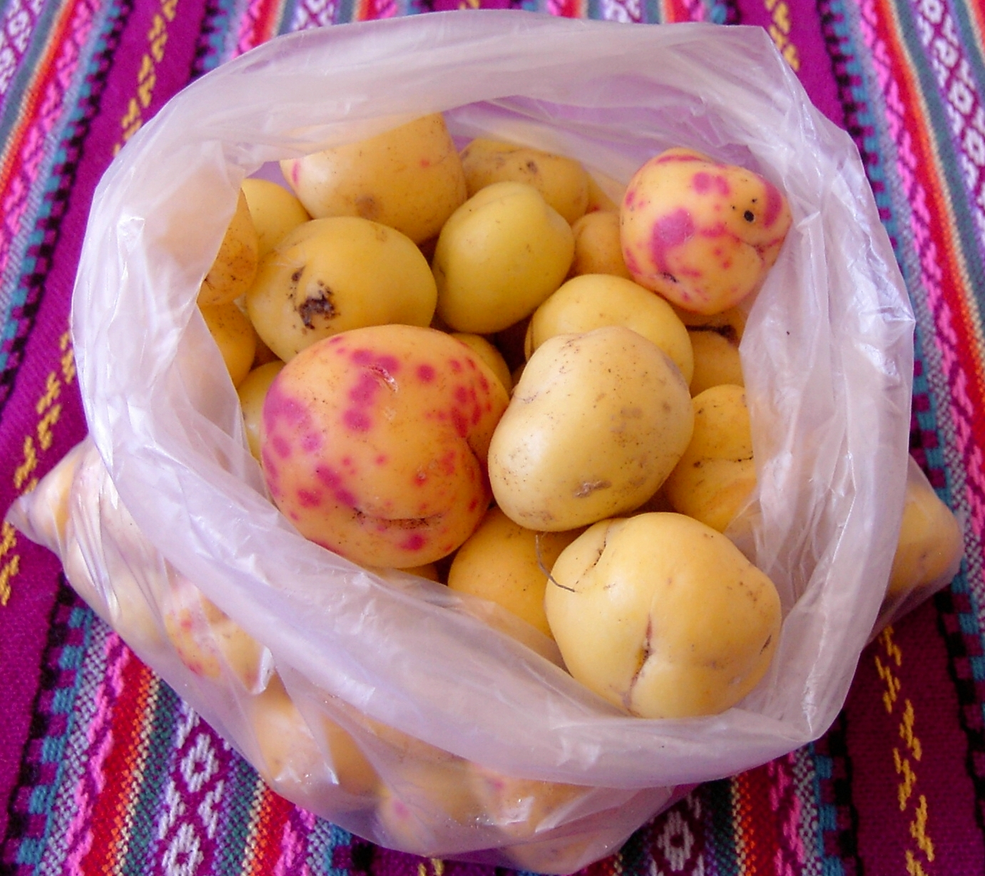 Ullucos (Ullucus tuberosus)